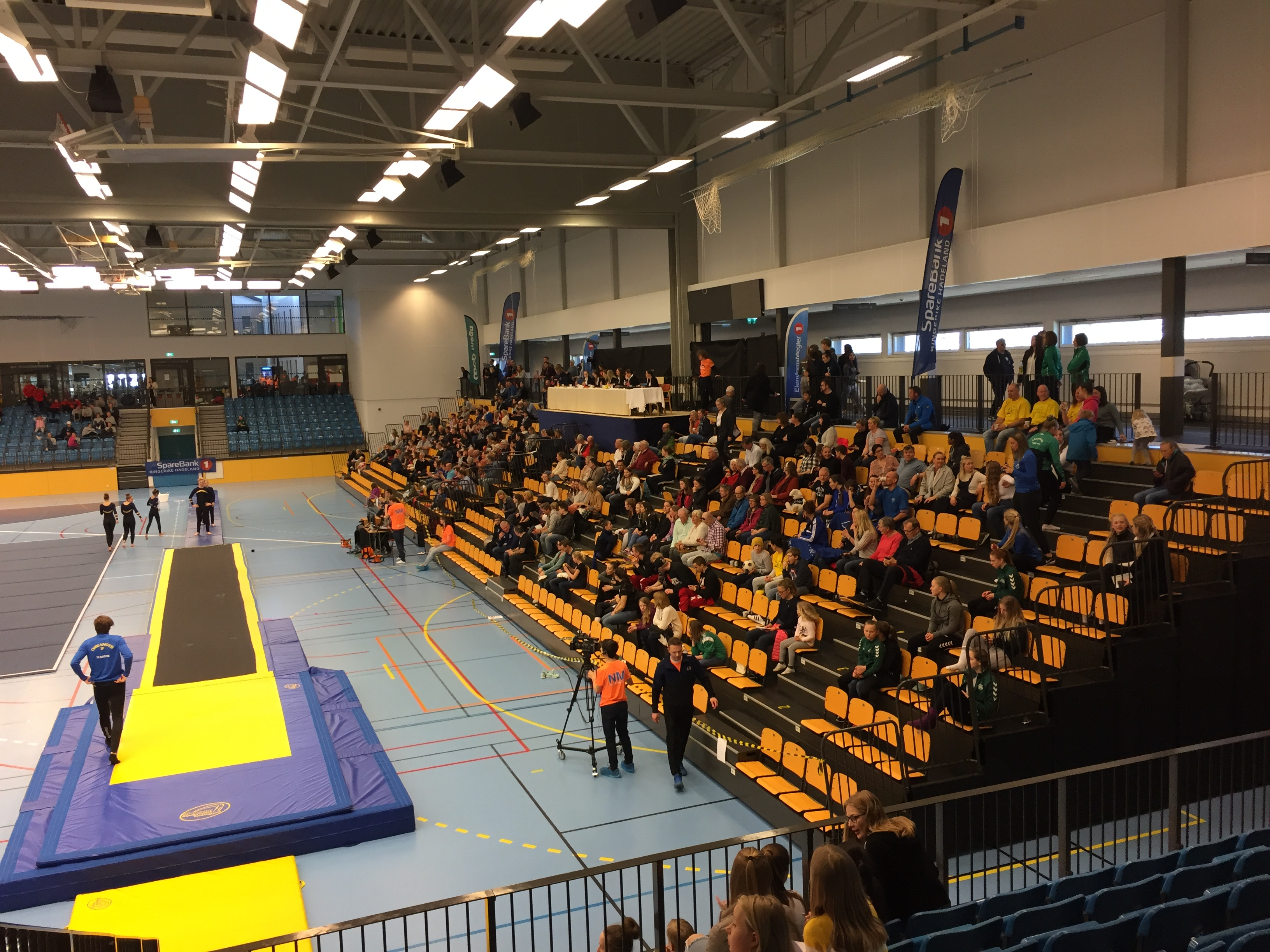 J-NM troppsturn 2017 Ringerike - Tilskuere